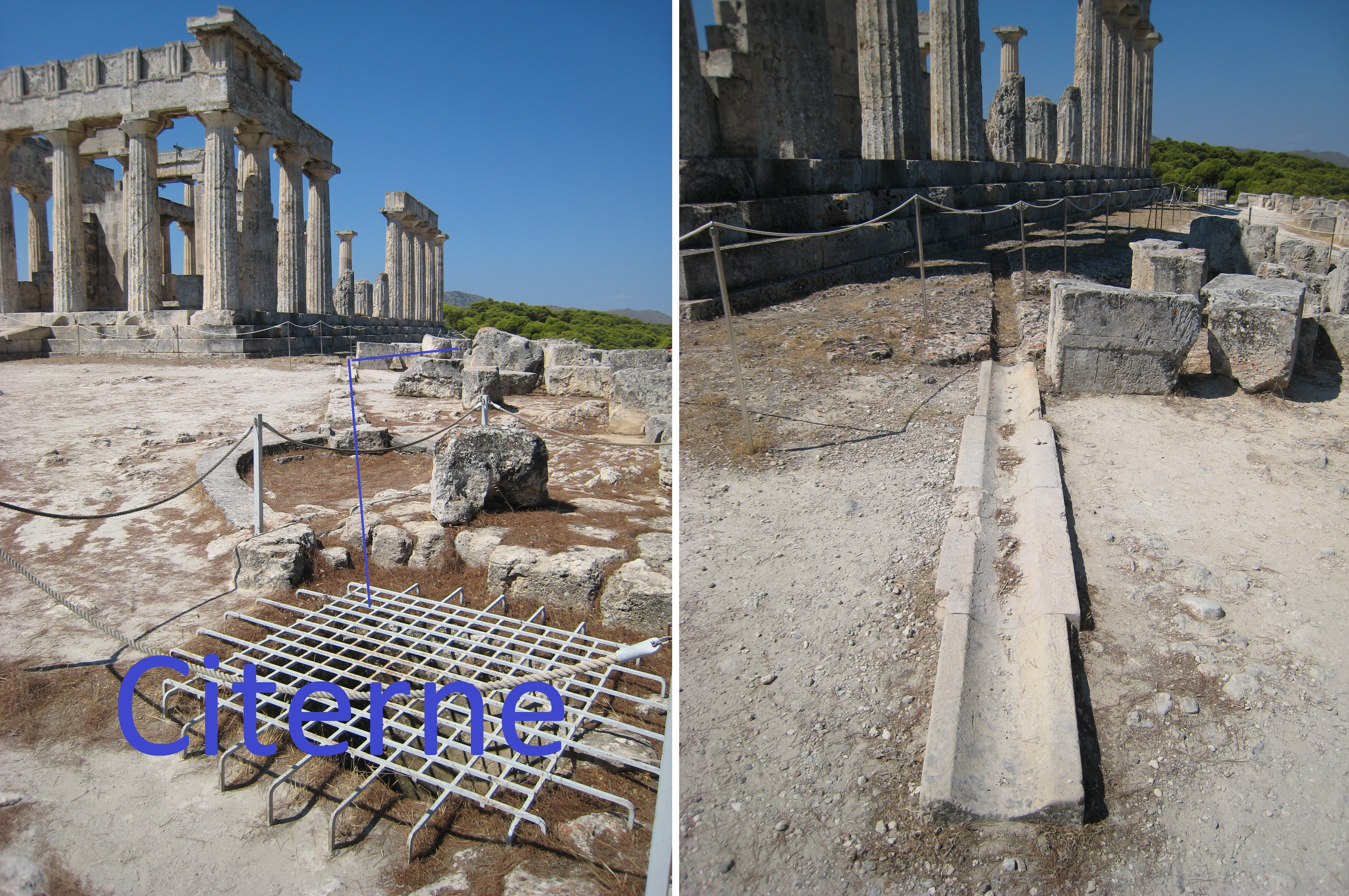 Système de récupération de l'eau et réservoir du temple.